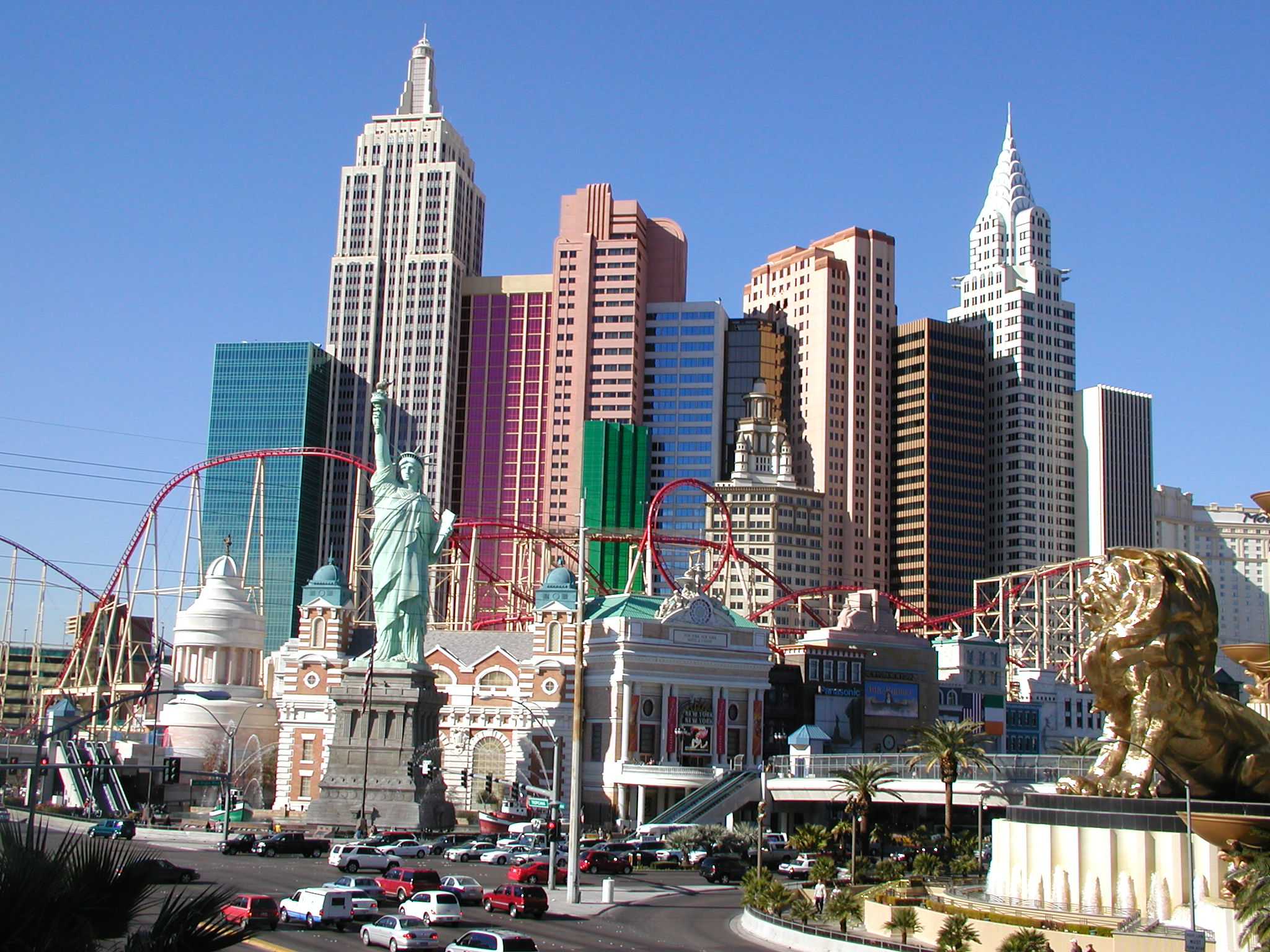 A Las Vegas Boulevard, mais conhecida como "STRIP". Nesta avenida ficam localizados os maiores cassinos da cidade.